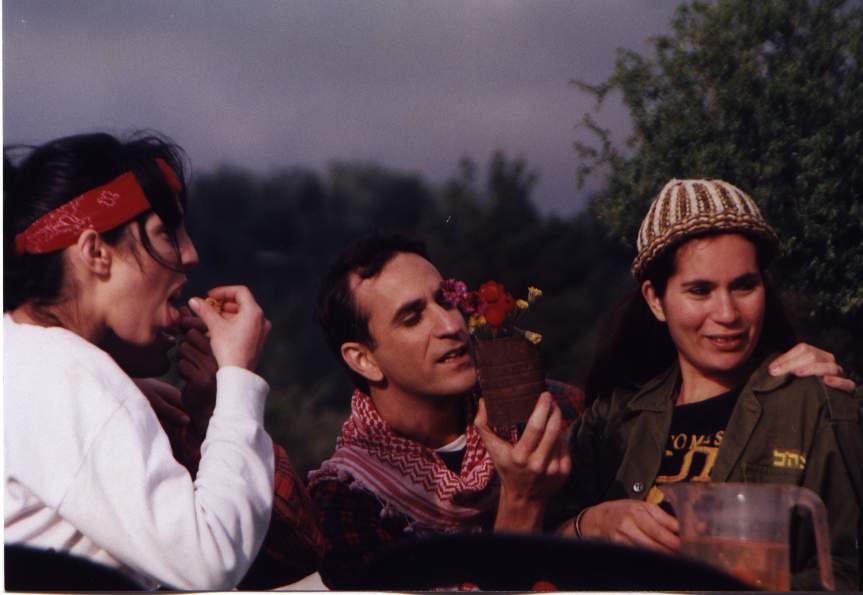 הגרעין הקשה 2